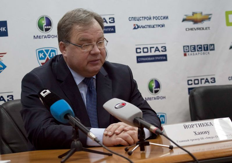 Фотография Ханну Йортикки